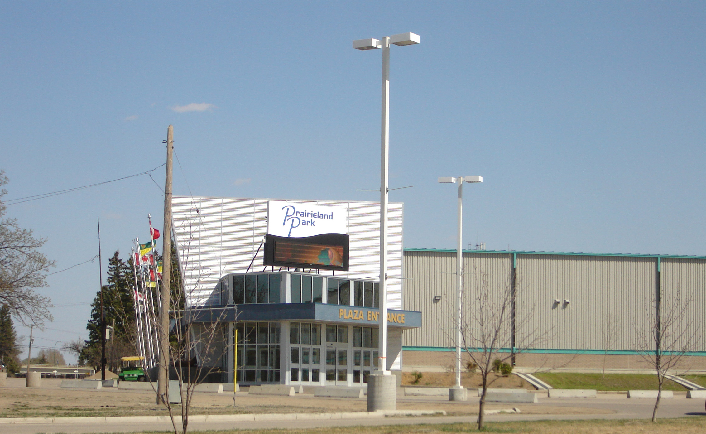 Prairieland Park,Exhibition, Saskatoon subdivision Saskatoon, Saskatchewan, Canada